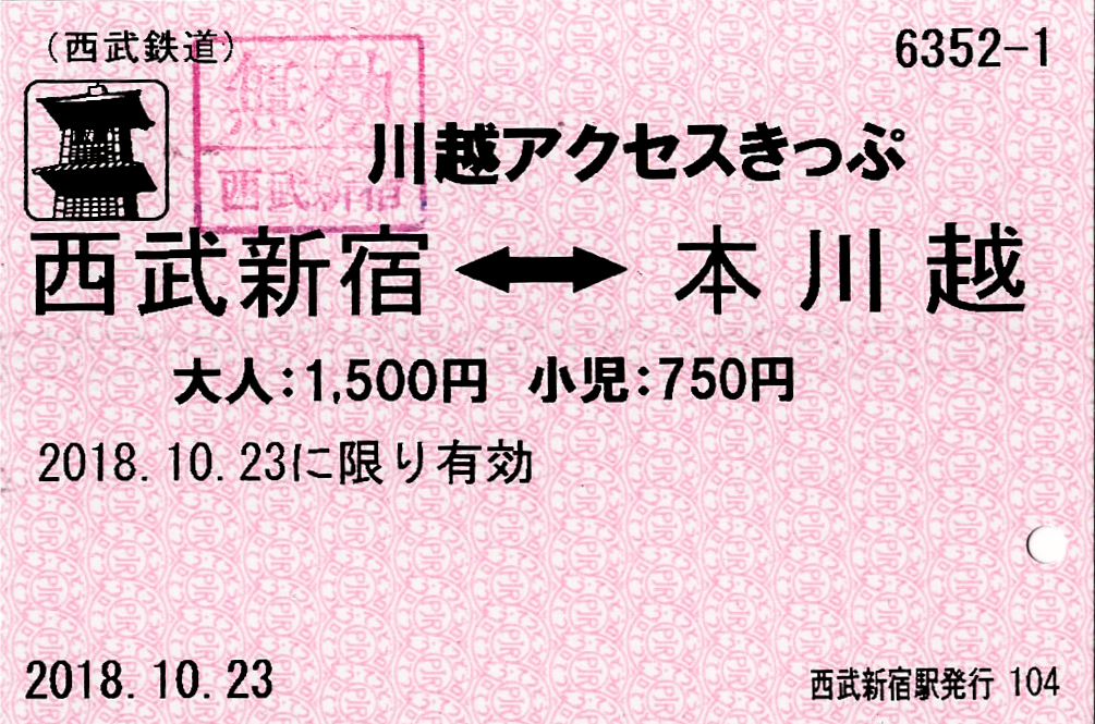 西武鉄道発行 川越アクセスきっぷ